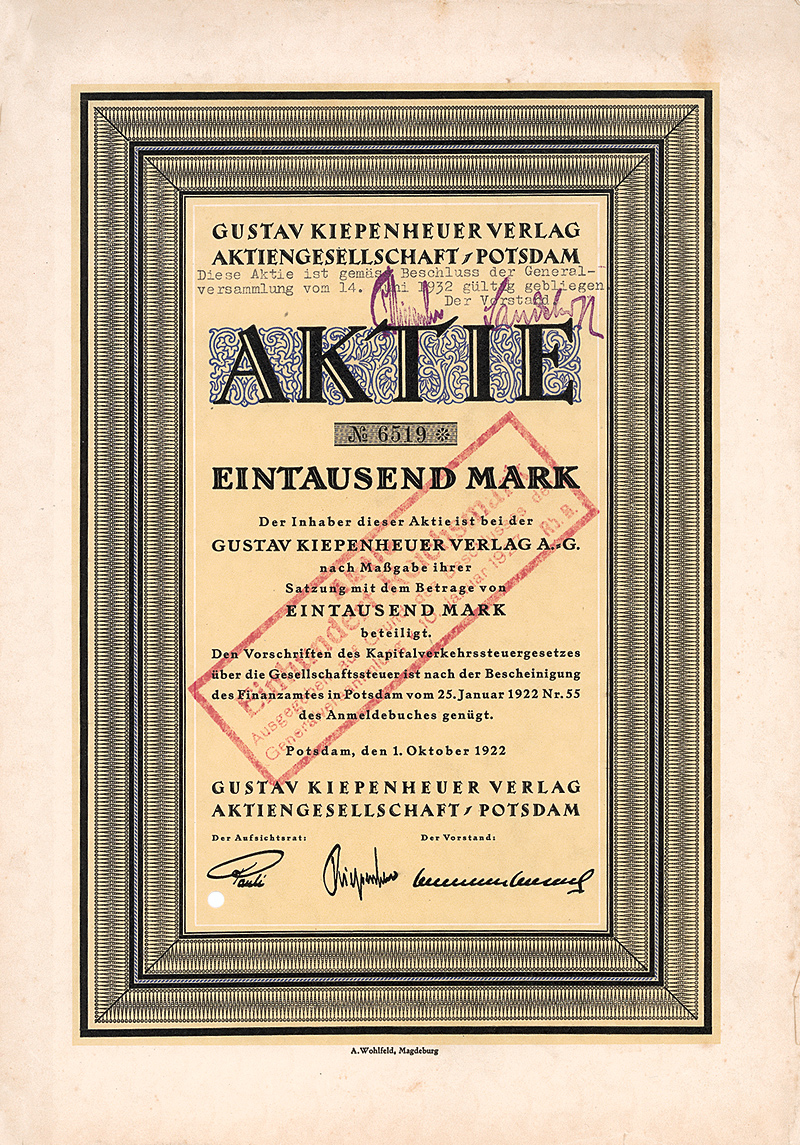 Aktie über 1000 Mark der Gustav Kiepenheuer Verlag AG vom 1. Oktober 1922